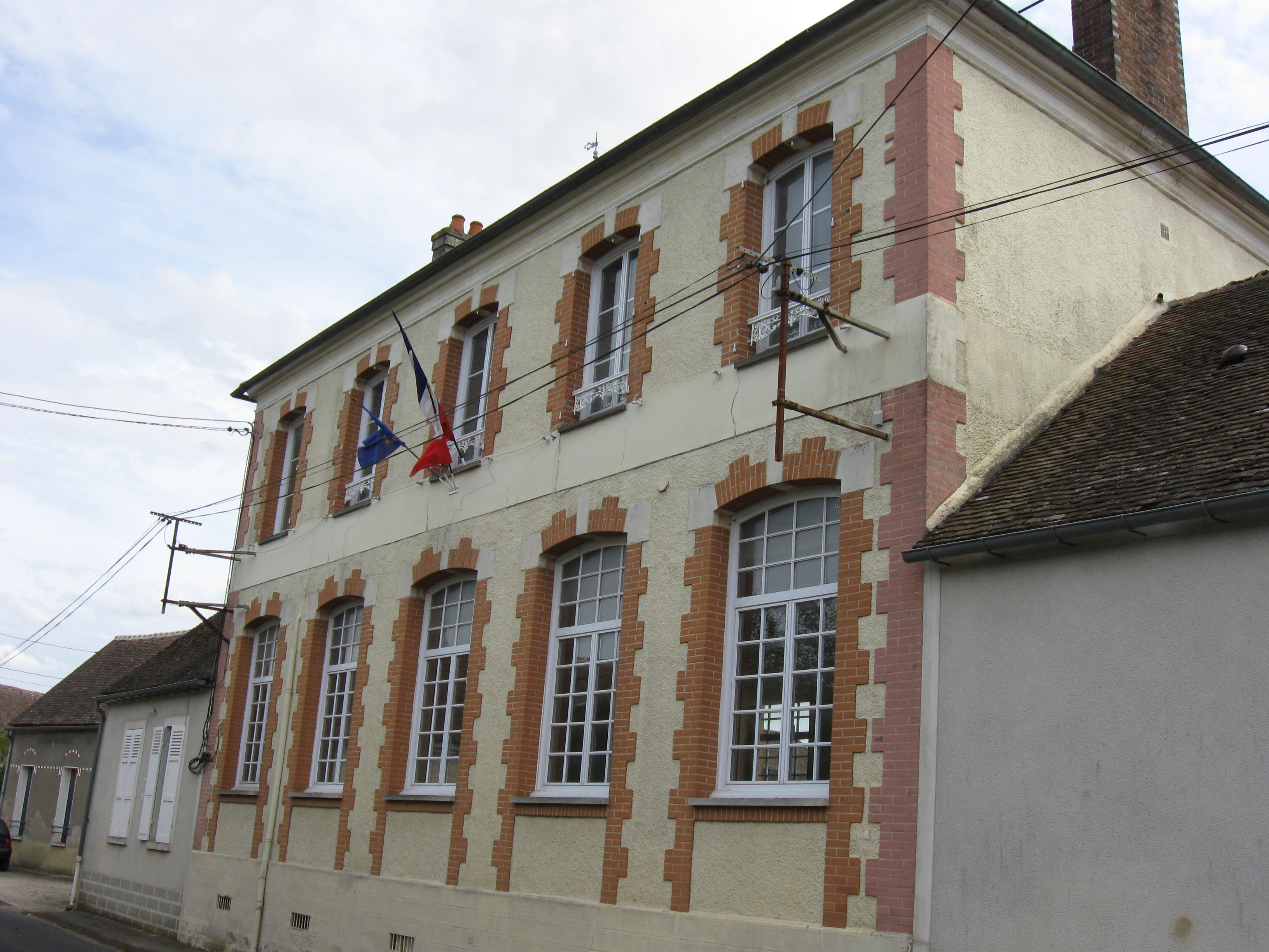 La mairie d'Arville. (département de la Seine-et-Marne, région Île-de-France).